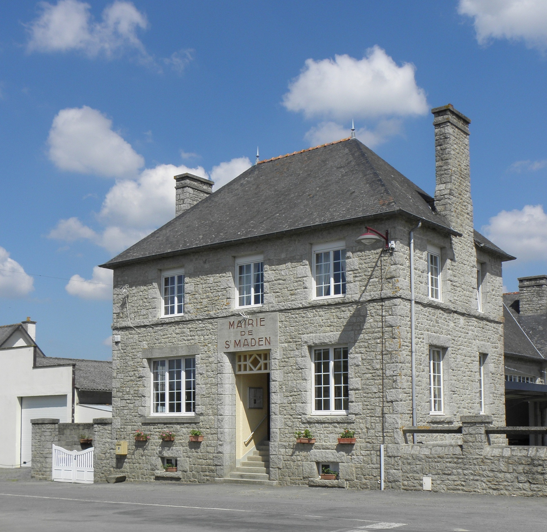 Mairie de Saint-Maden (22).